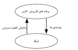 يك مدل ساده از QoS